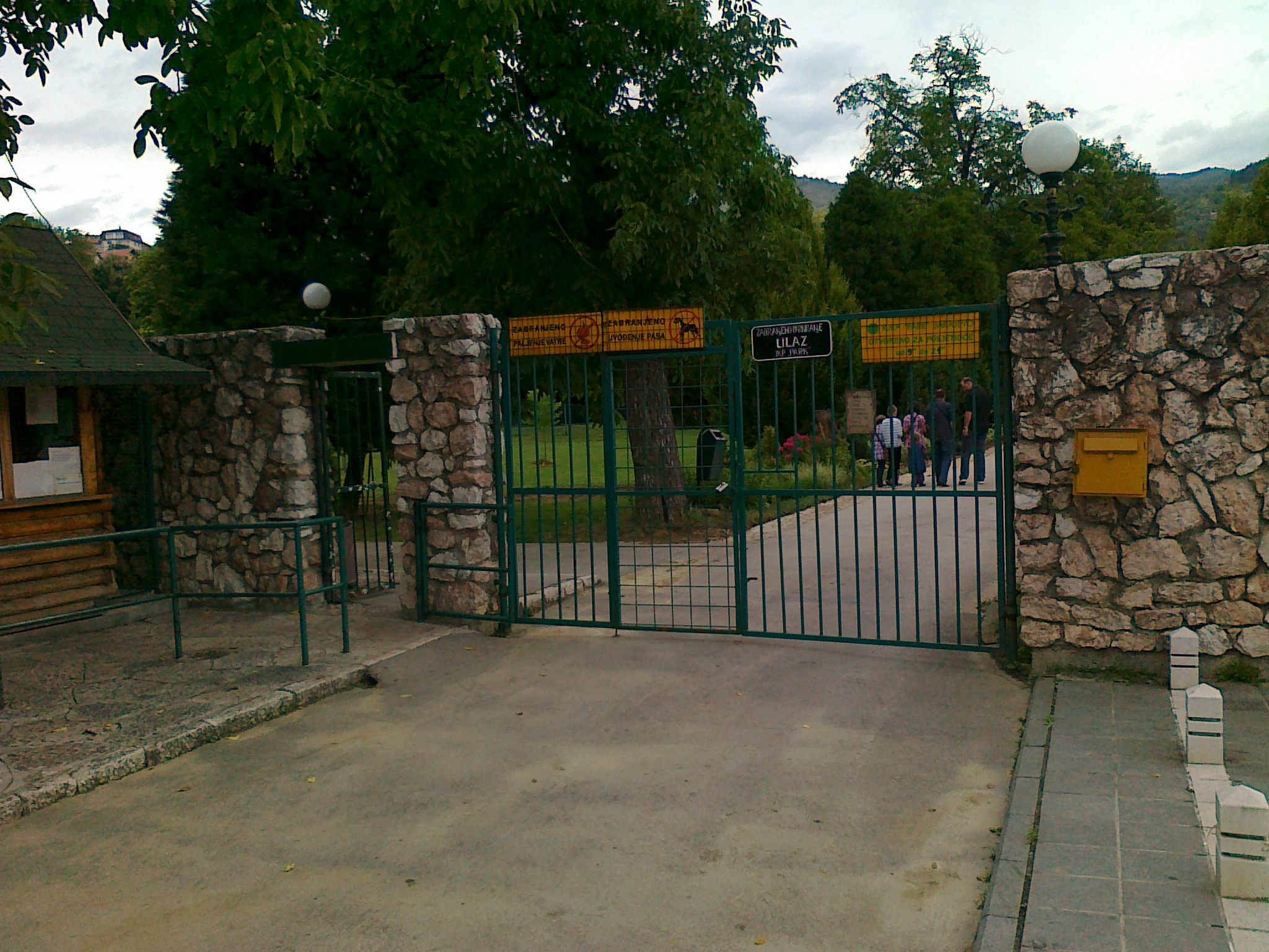 Entrance to Pionirska dolina